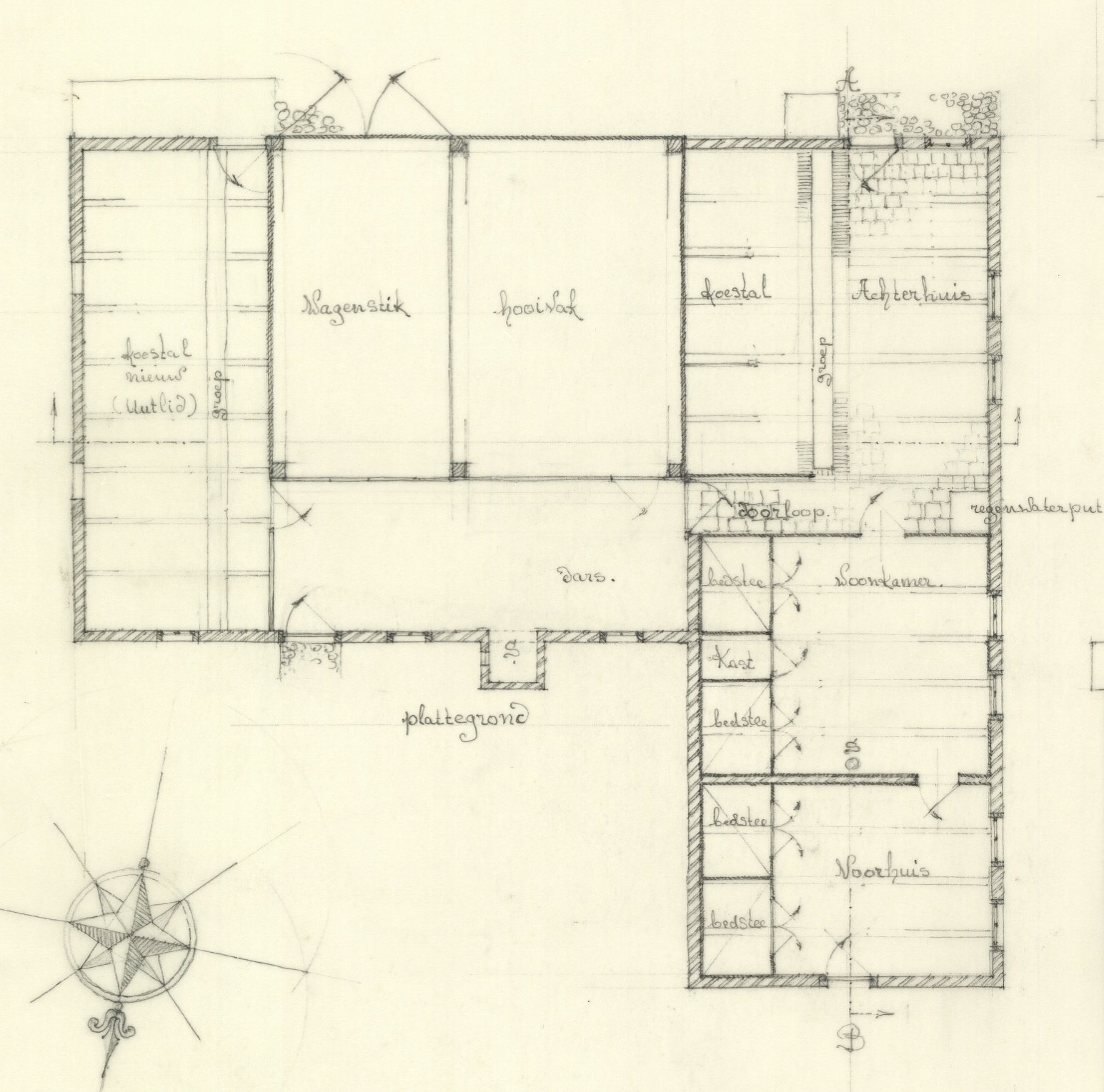 SHBO 0342